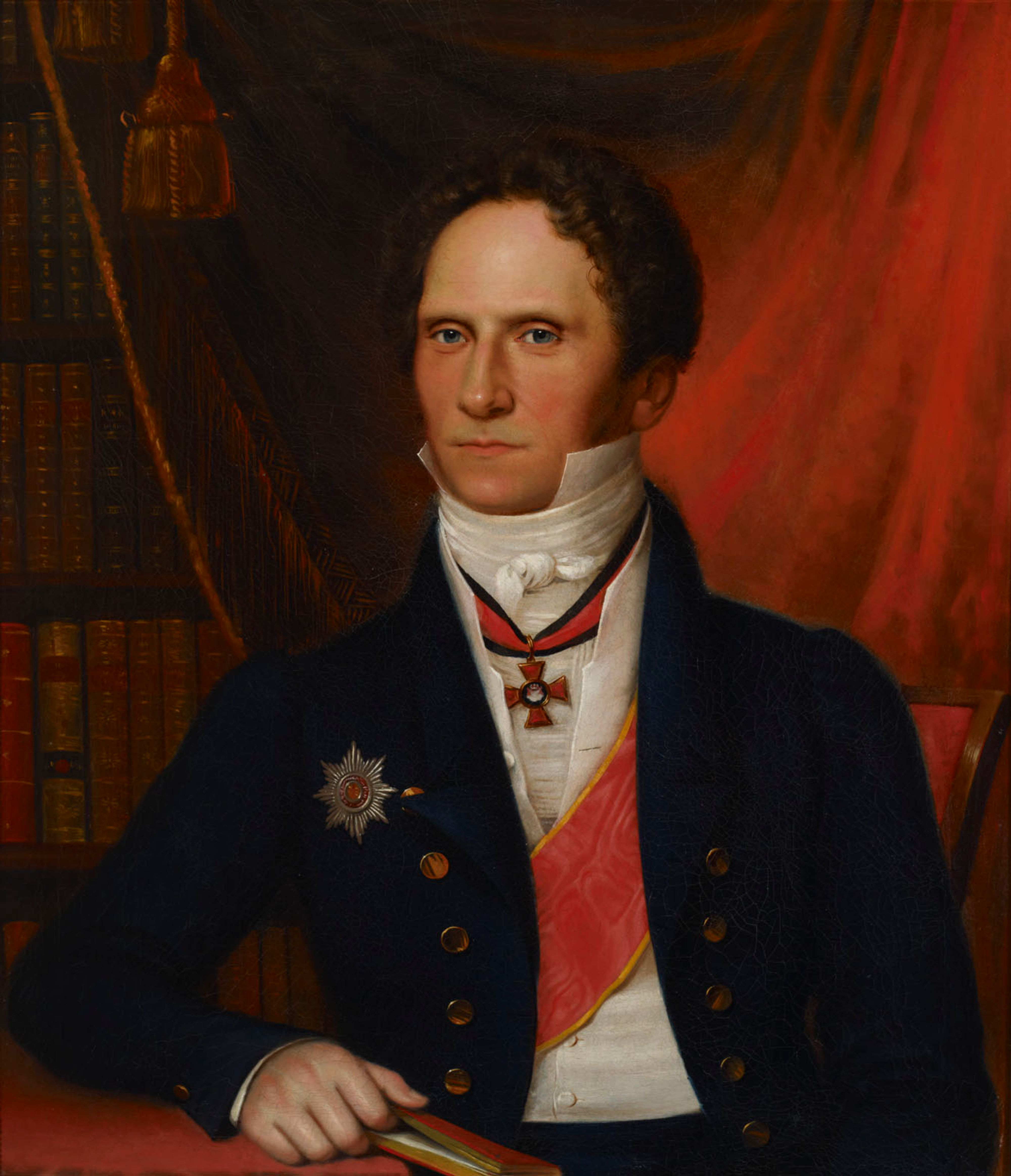 Porträtt af friherre Karl Walle Carl Johan Walleenlabel QS:Len,"Carl Johan Walleen" label QS:Lru,"Барон Карл Юхан Валлеен"